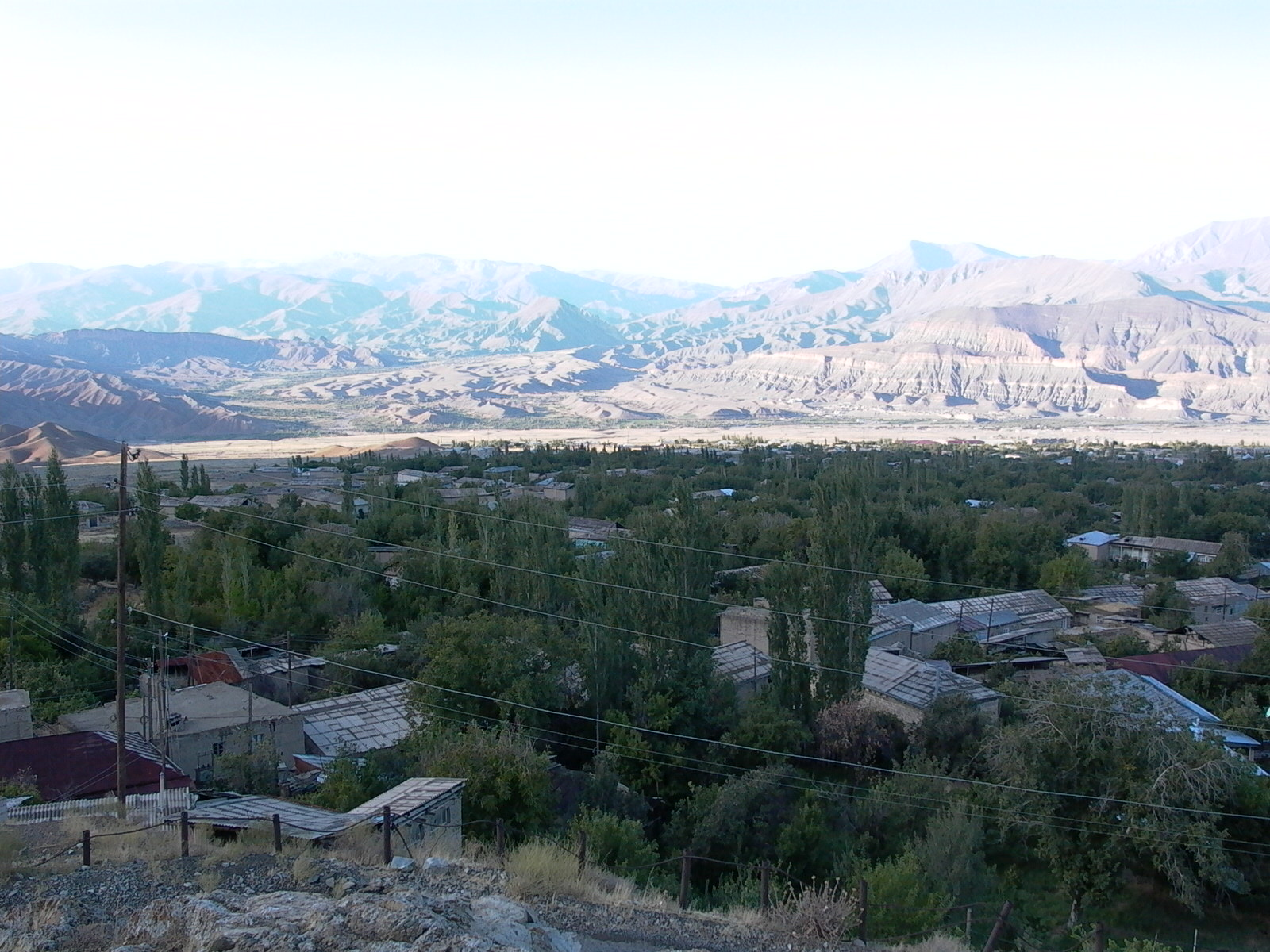 Nakhichevan Autonomous Republic, Azerbaijan